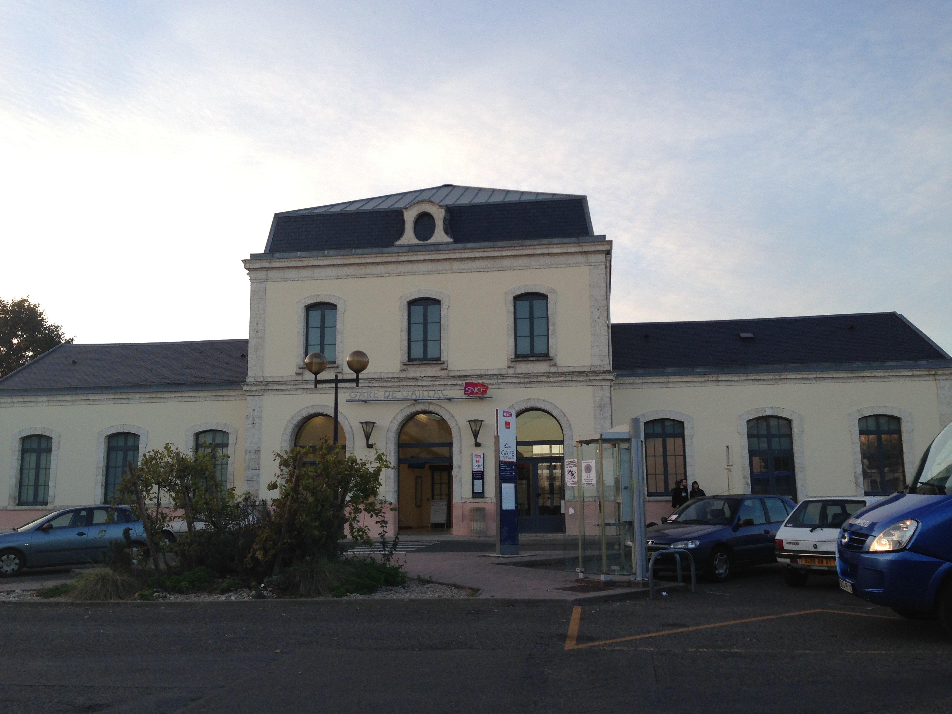 Gare de Gaillac-2014